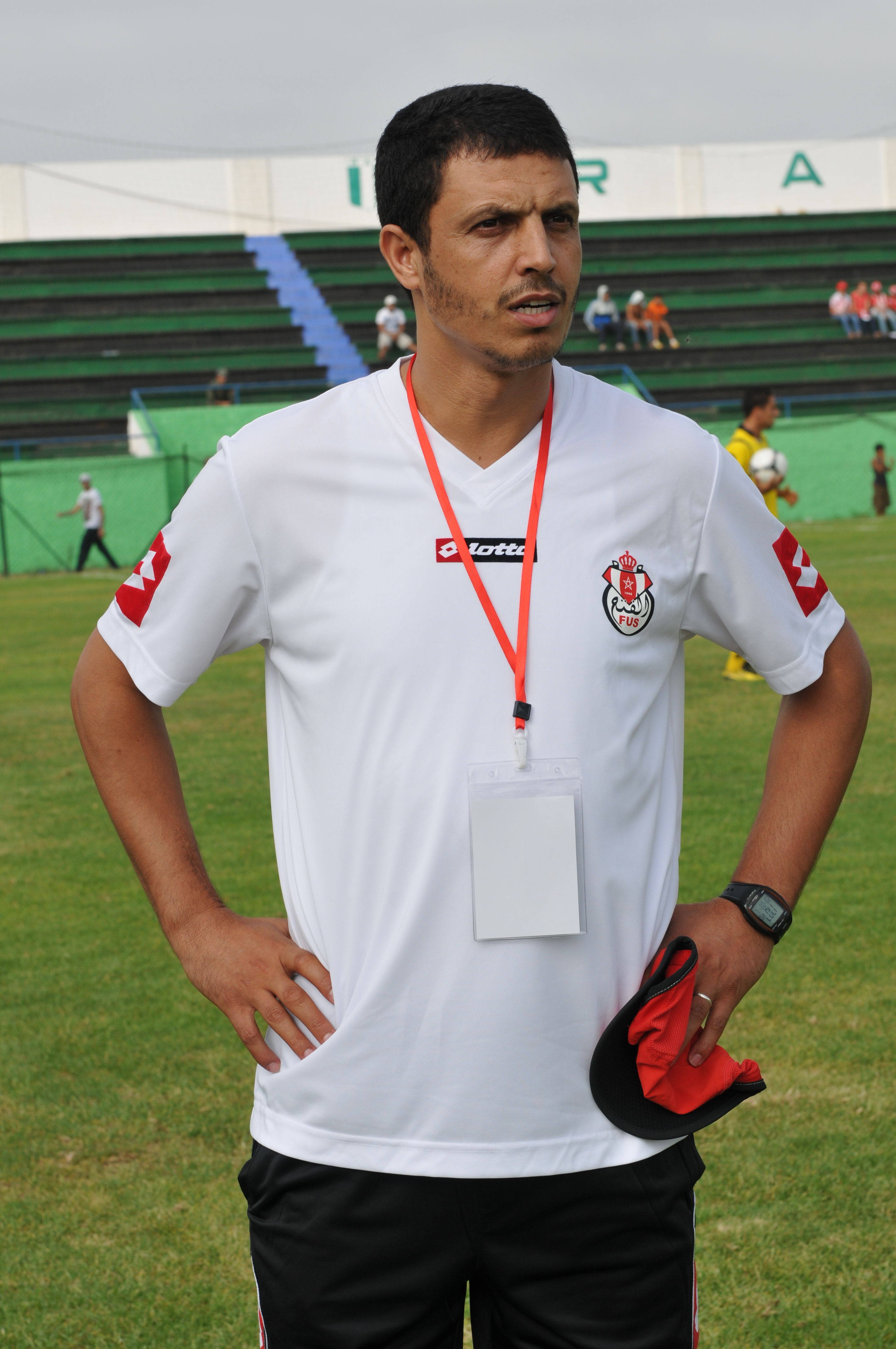 Jamal Sellami lors du match du WA Casablanca contre le FUS de Rabat au tournoi amical Ahmed Antifi, le 22 août 2012.